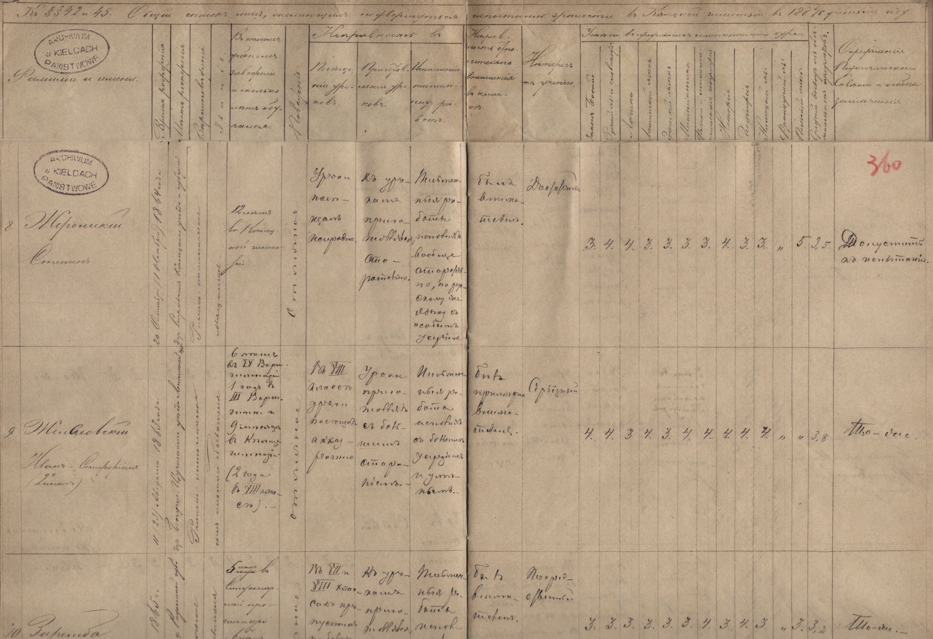 Katalog ocen S. Żeromskiego w Kieleckim Gimnazjum Męskim za rok szkolny 1885/6